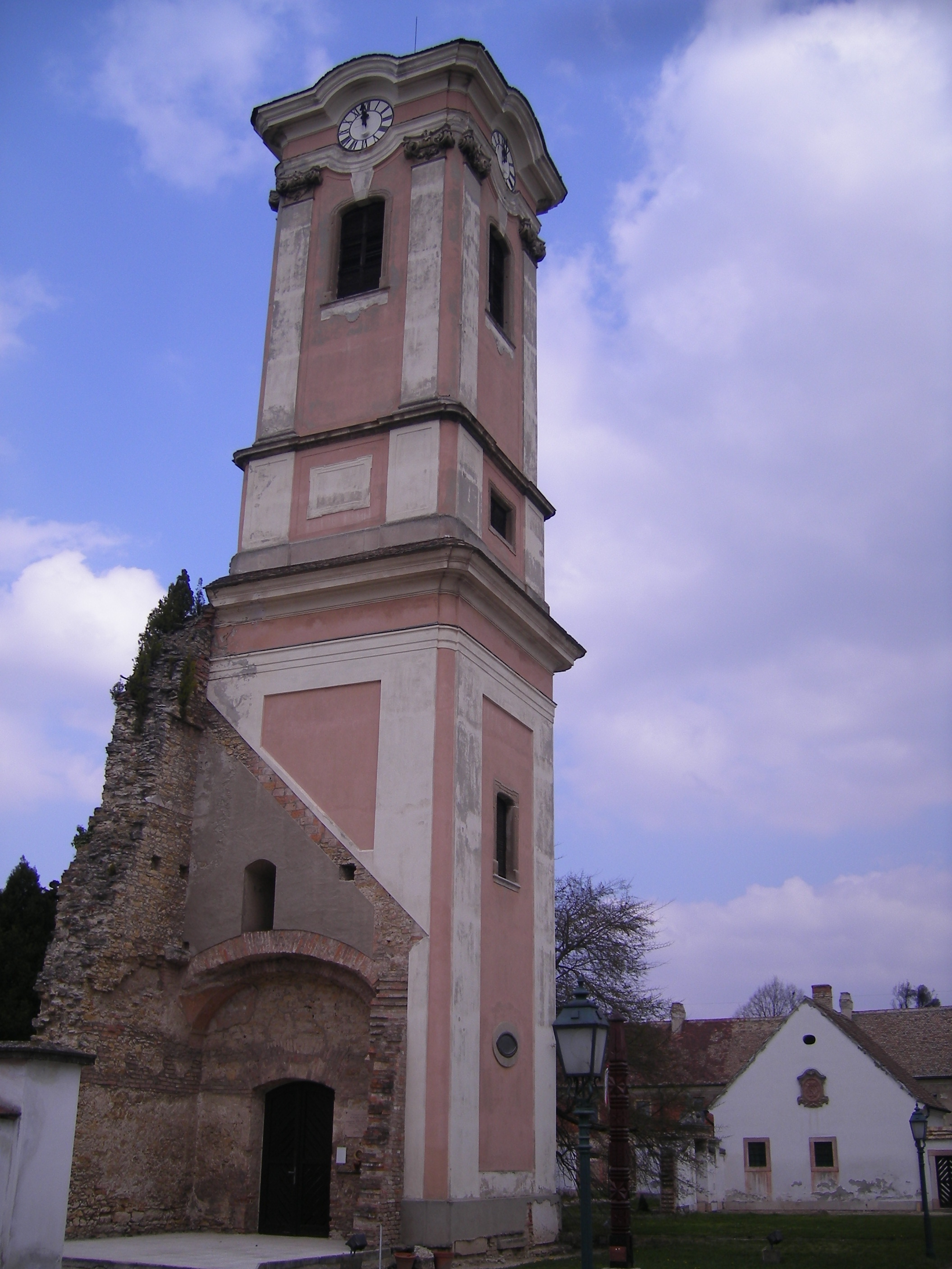 Oroszlány - majkpusztai kamalduli apátság